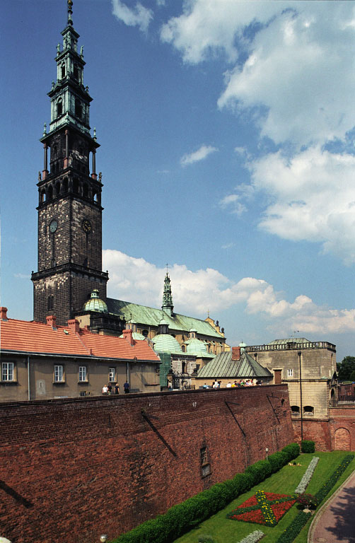 Poland, Jura, Czestochowa, Jasna Gora